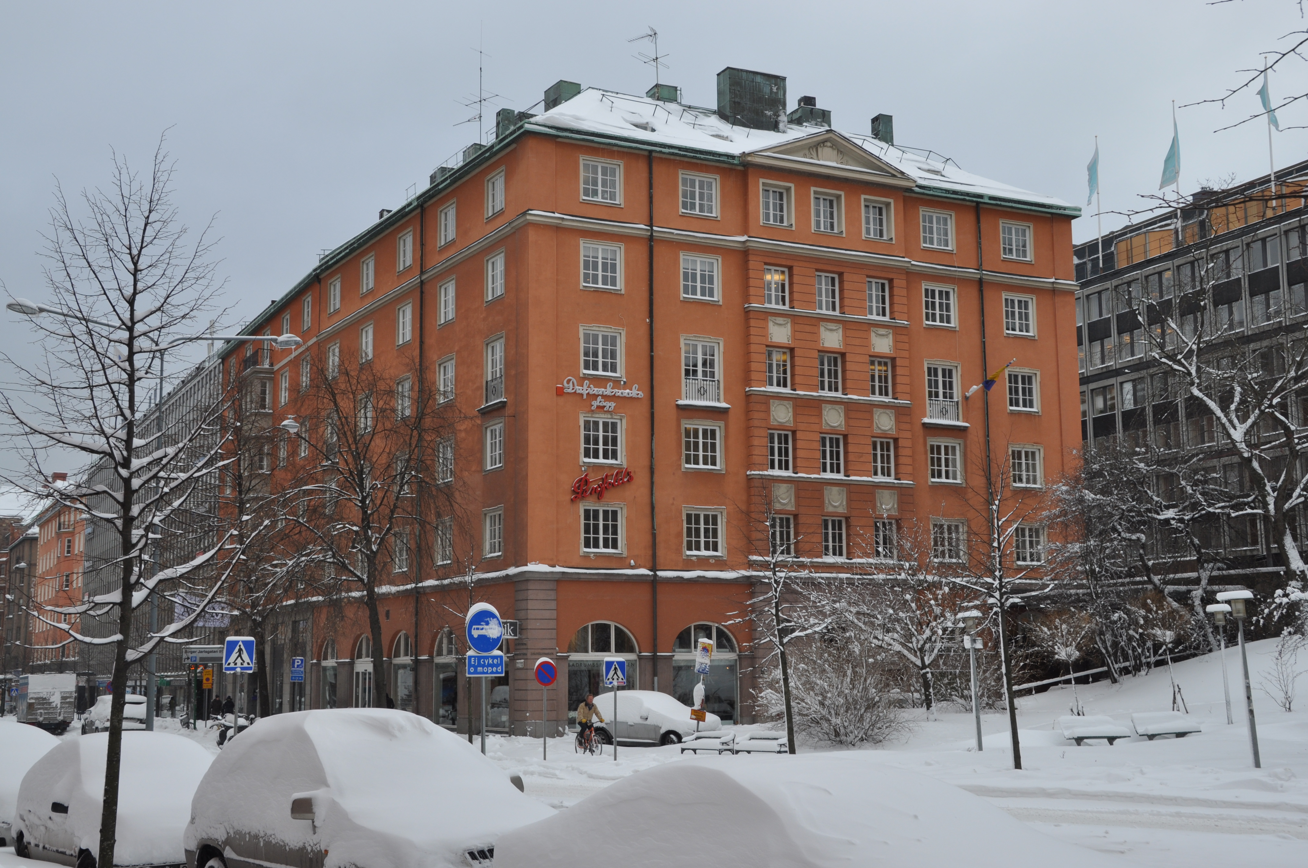 Embassy of Bosnia and Herzegovina. Birger Jarlsgatan 55. Byggnadsår 1927-28, arkitekt Josef Östlihn, byggherre Kindblom C Forss AB.